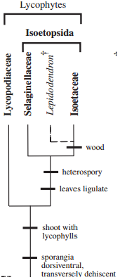 relação filogenetica